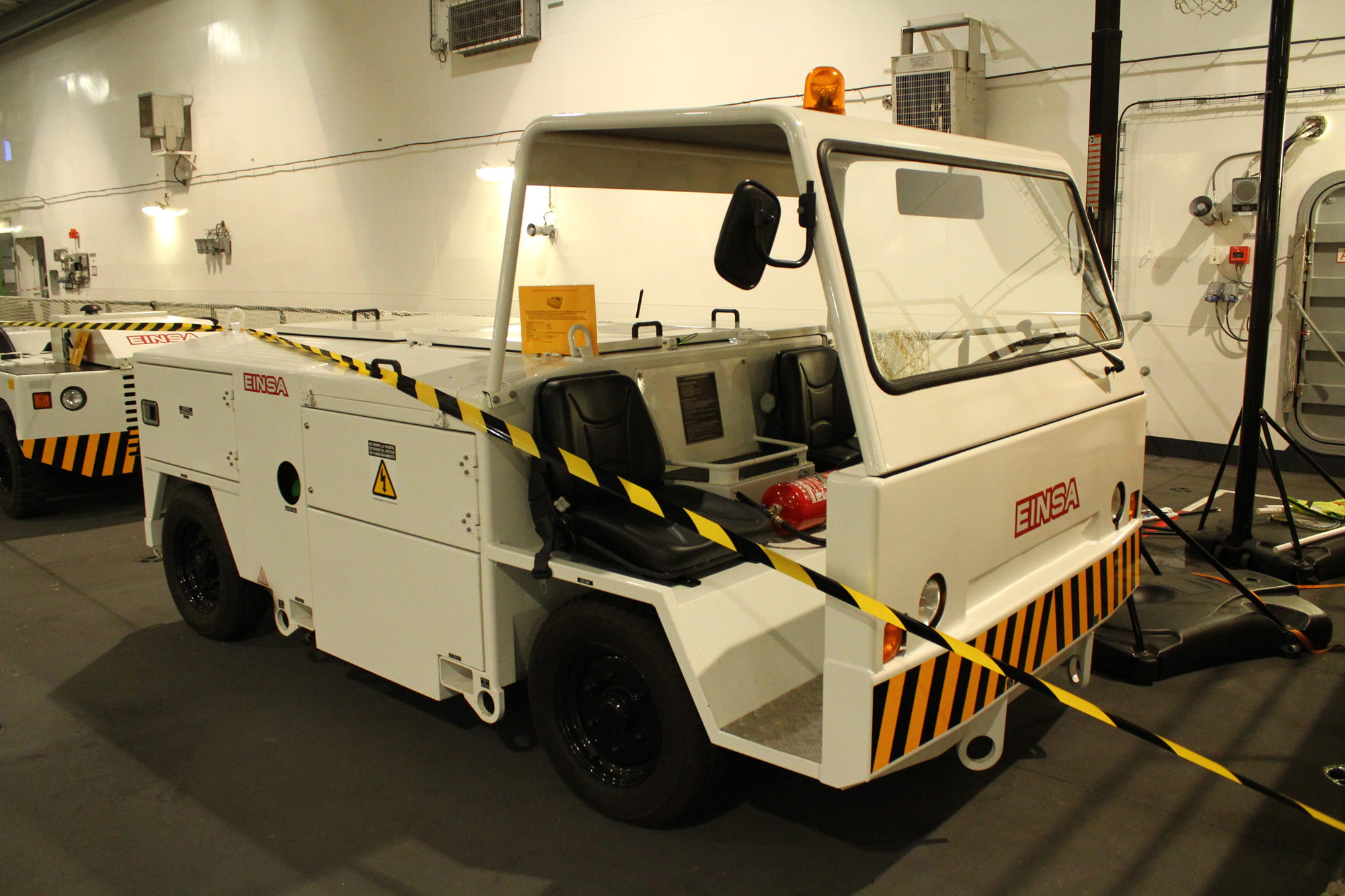 Buque de Proyección Estratégica "Juan Carlos I" de la Armada Española, amarrado en el muelle de transatlánticos de Vigo. Este barco es una mezcla de portaaviones y buque de desembarco: puede lanzar aviones, helicópteros y lanchas con tanques, blindados y todo tipo de vehículos desde un muelle inundable situado en la popa. The L-61 "Juan Carlos I" in Vigo Strategic Projection Ship "Juan Carlos I" of the Spanish Navy, moored at the liners dock in Vigo. This boat is a mix of aircraft carrier and landing ship, it can launch planes, helicopters and boats with tanks, armored vehicles and all kind of vehicles from a flooded dock located at the stern.